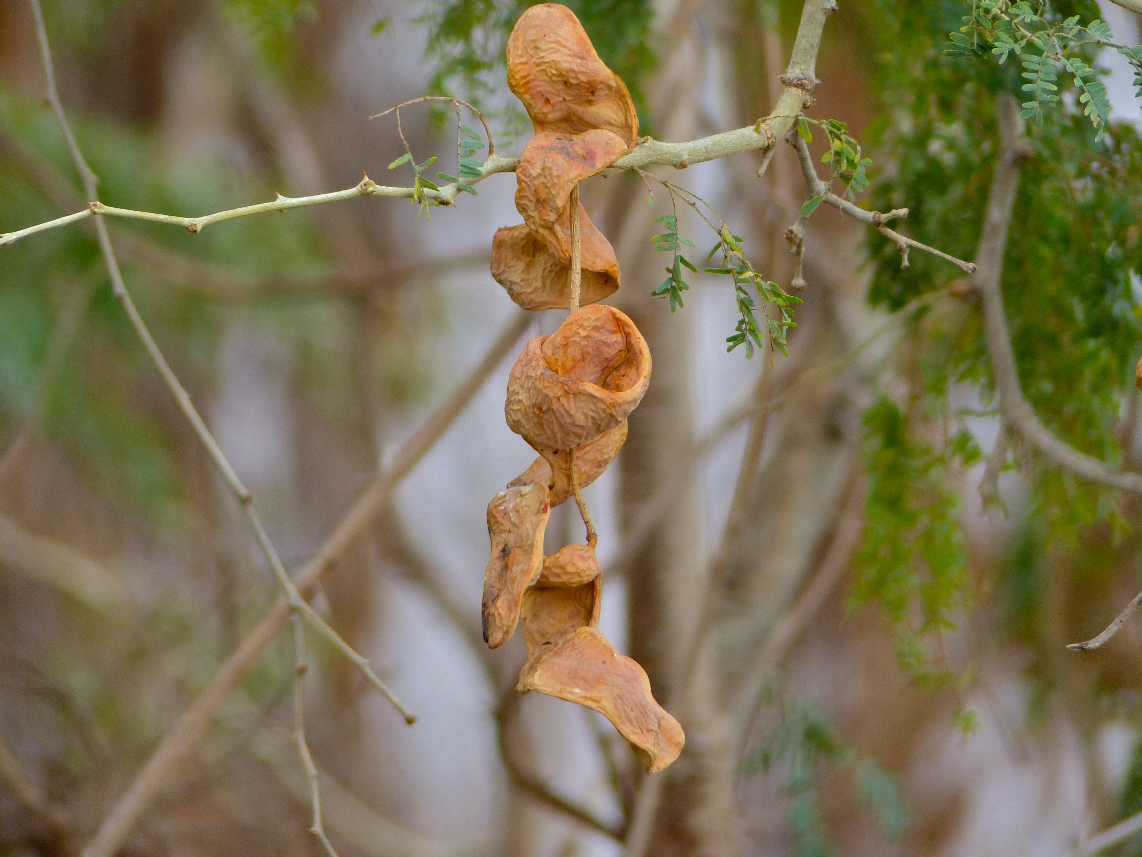 S63 Road, Pafuri area, Kruger NP, SOUTH AFRICA